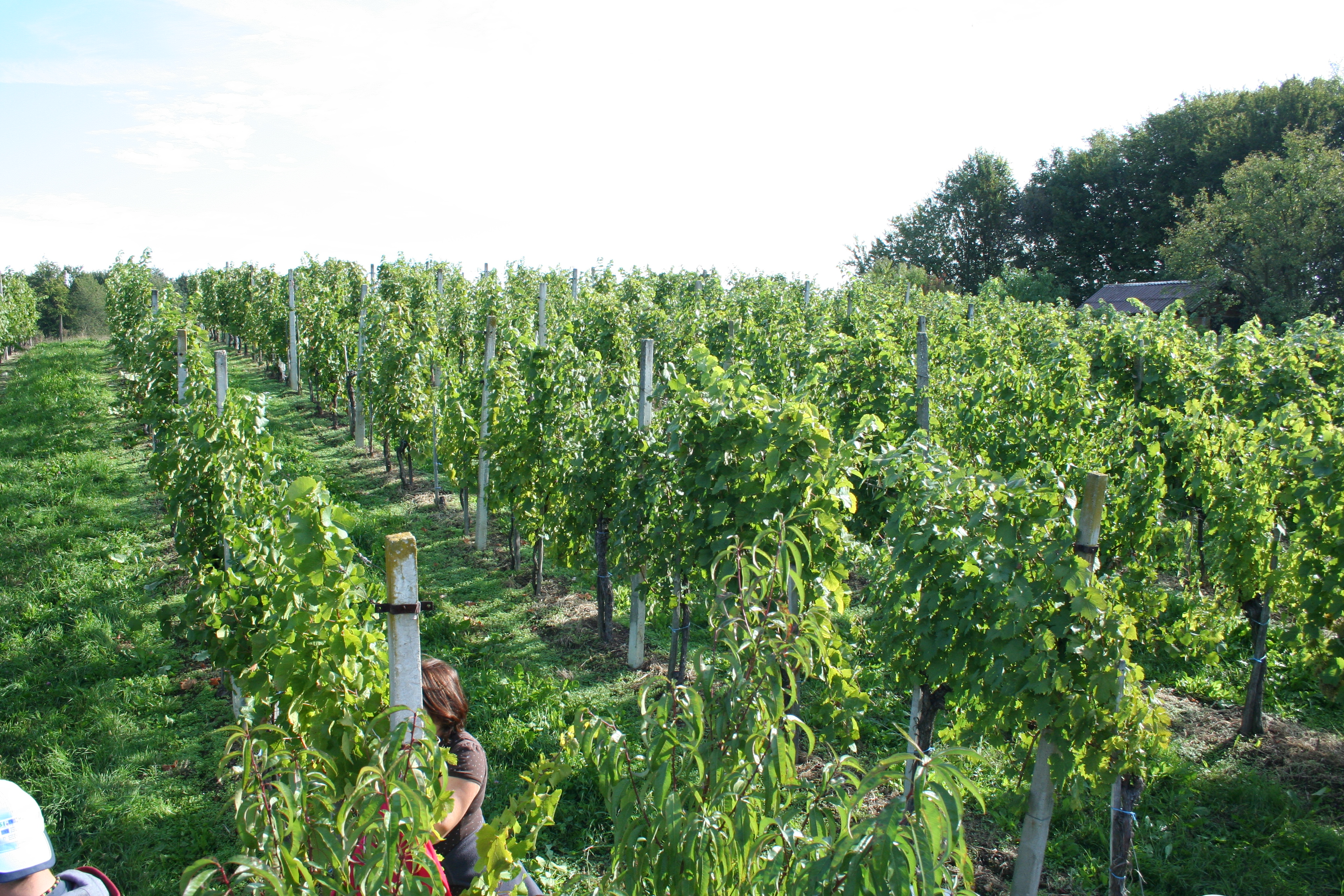 Vineyard